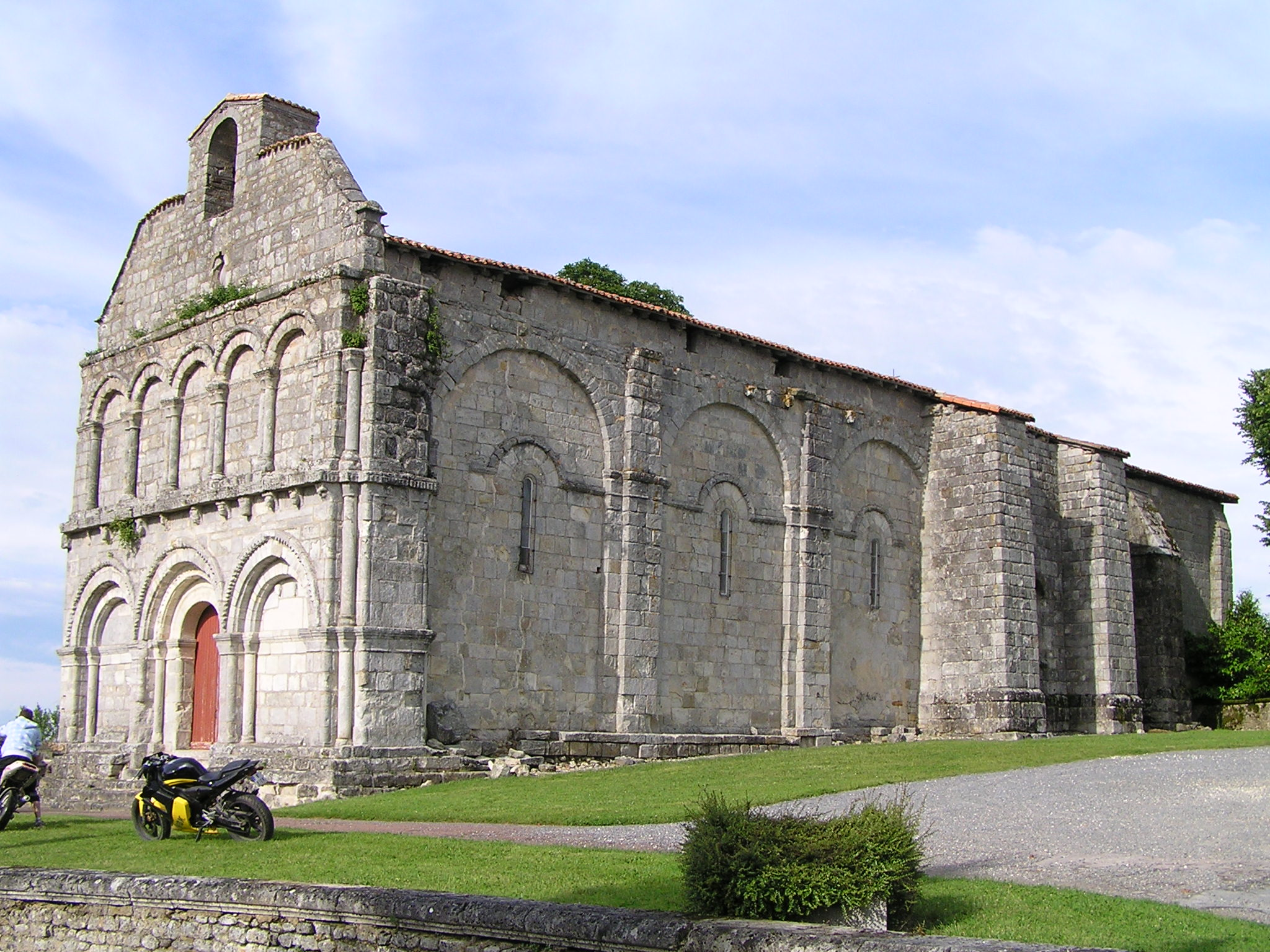 église de Chillac, Charente, France